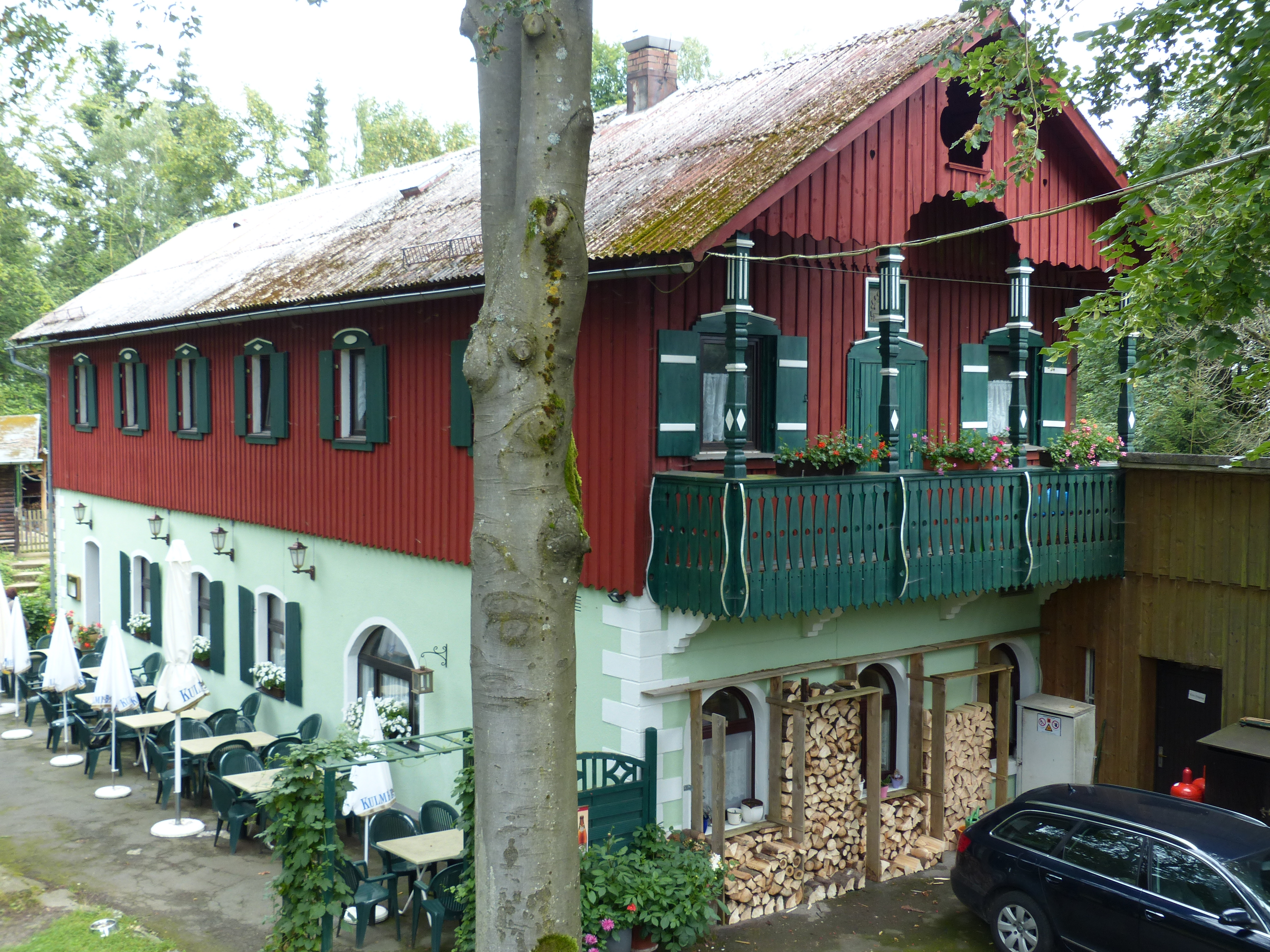 Serie Ansichten vom Weißenstein